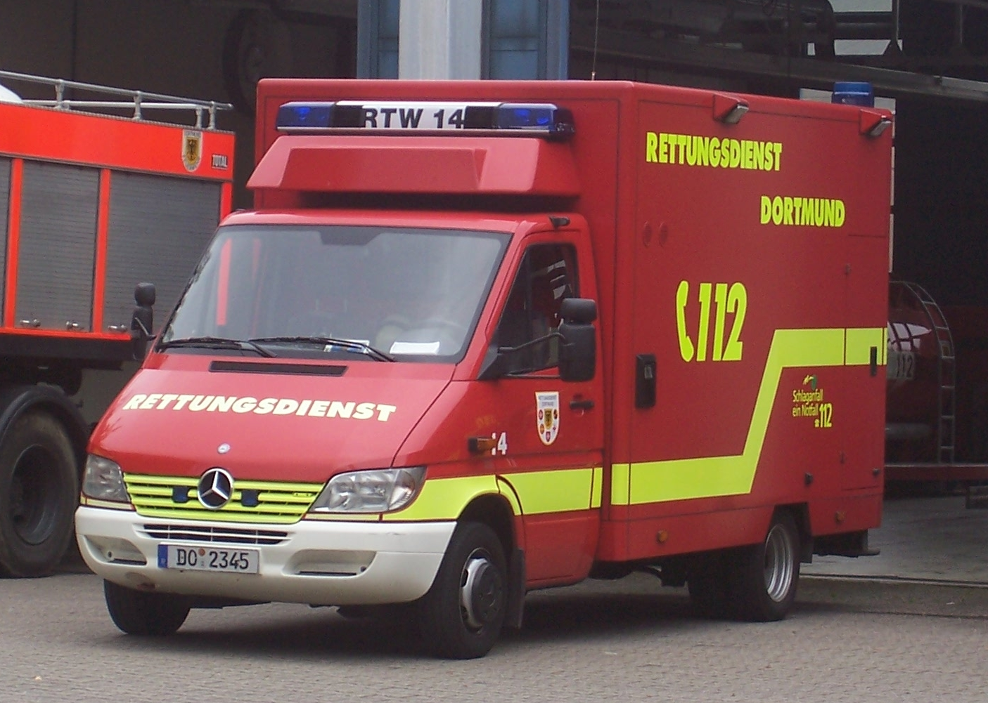 RTW der Berufsfeuerwehr Dortmund / Ambulance of the Fire department Dortmund